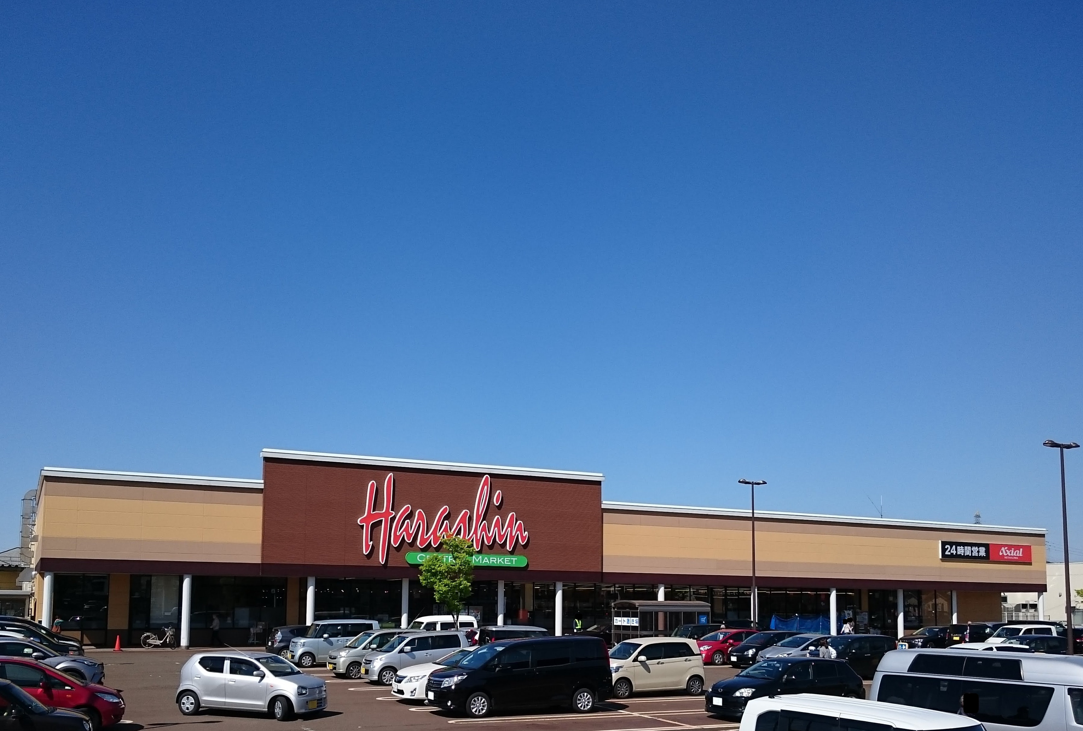 原信川崎店（最大面積を有する店舗）